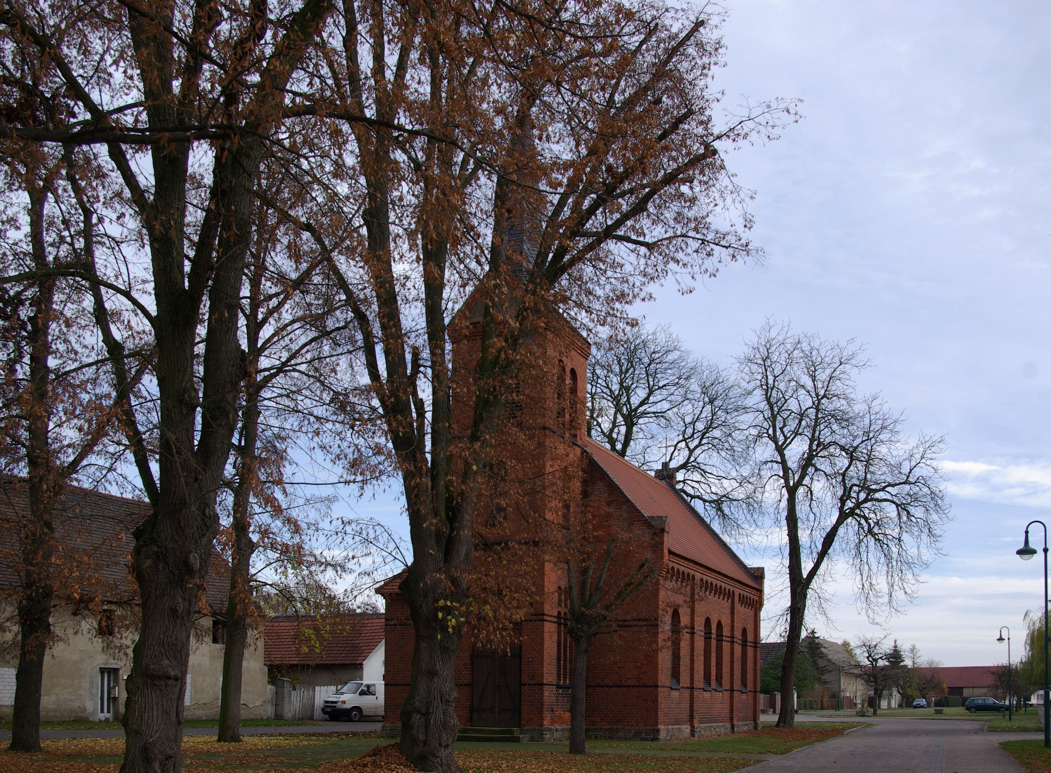 Schönewalde Ortsteil Brandis in Brandenburg. Die Kirche wurde 1896/1897 erbaut und steht unter Denkmalschutz.